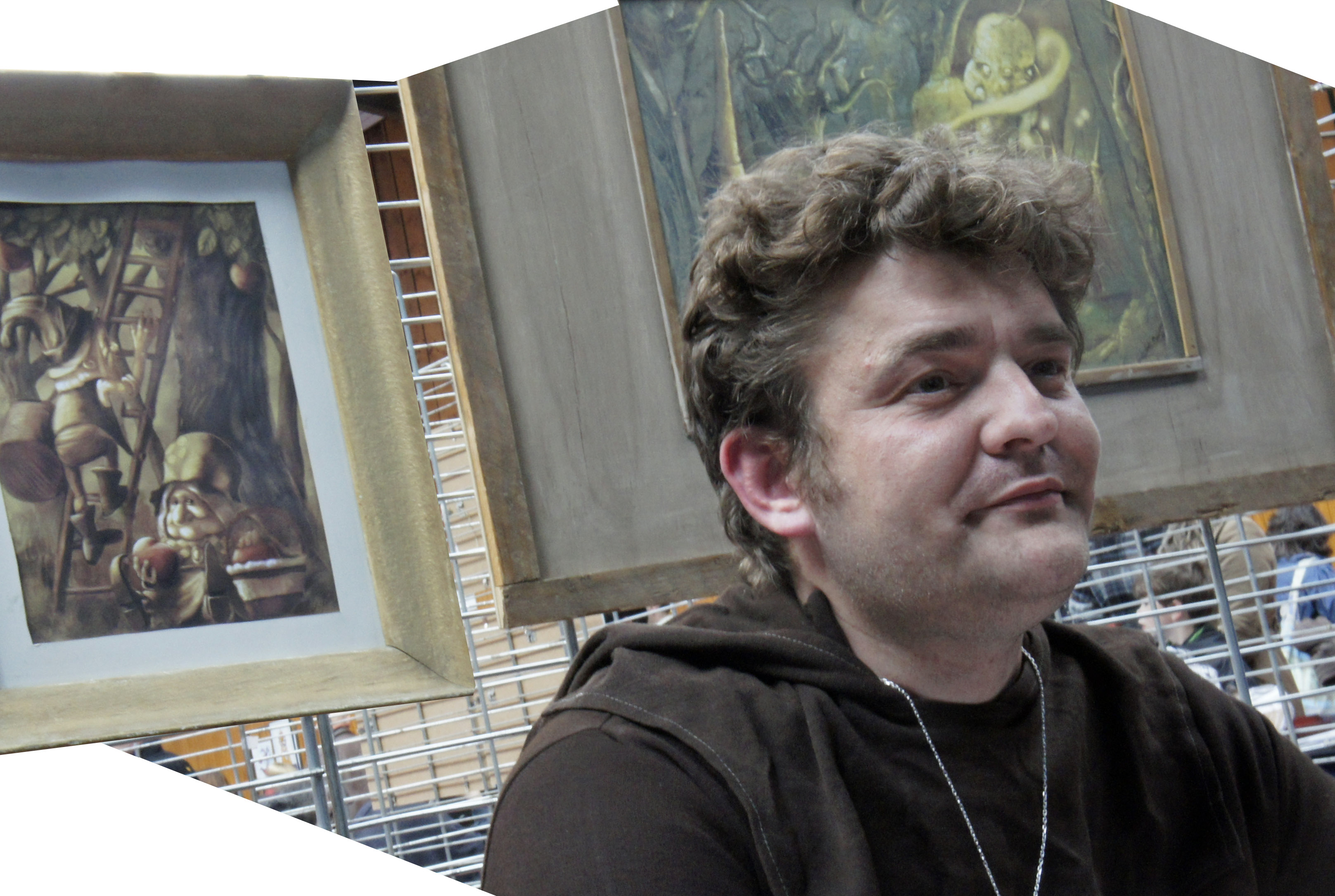 Godo lors du Printemps des Légendes.